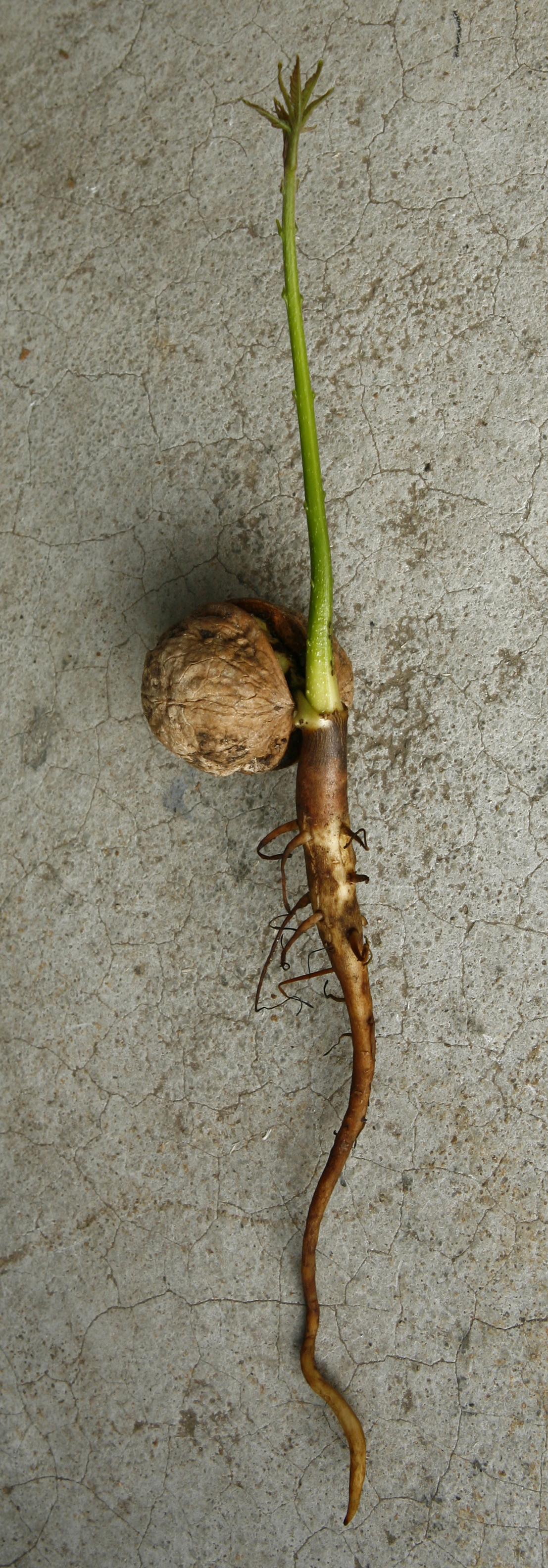 Spross der Walnuss